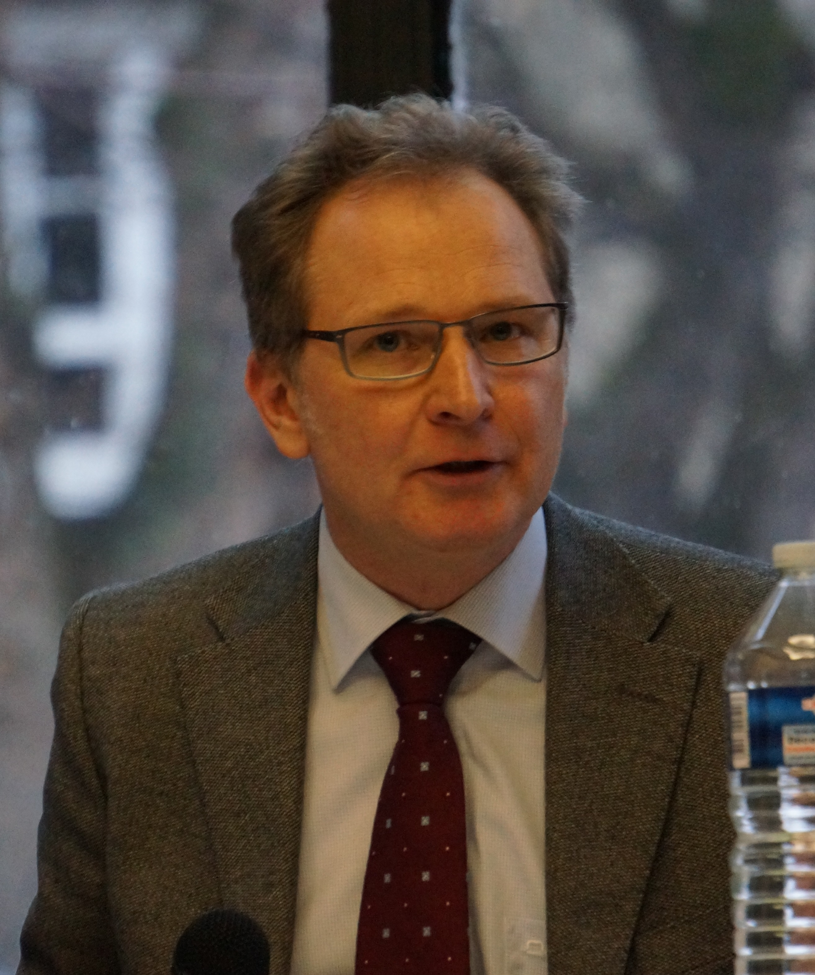 lors de imaginer la paix en Europe.